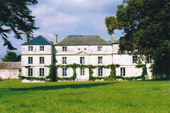 Château de la Marre